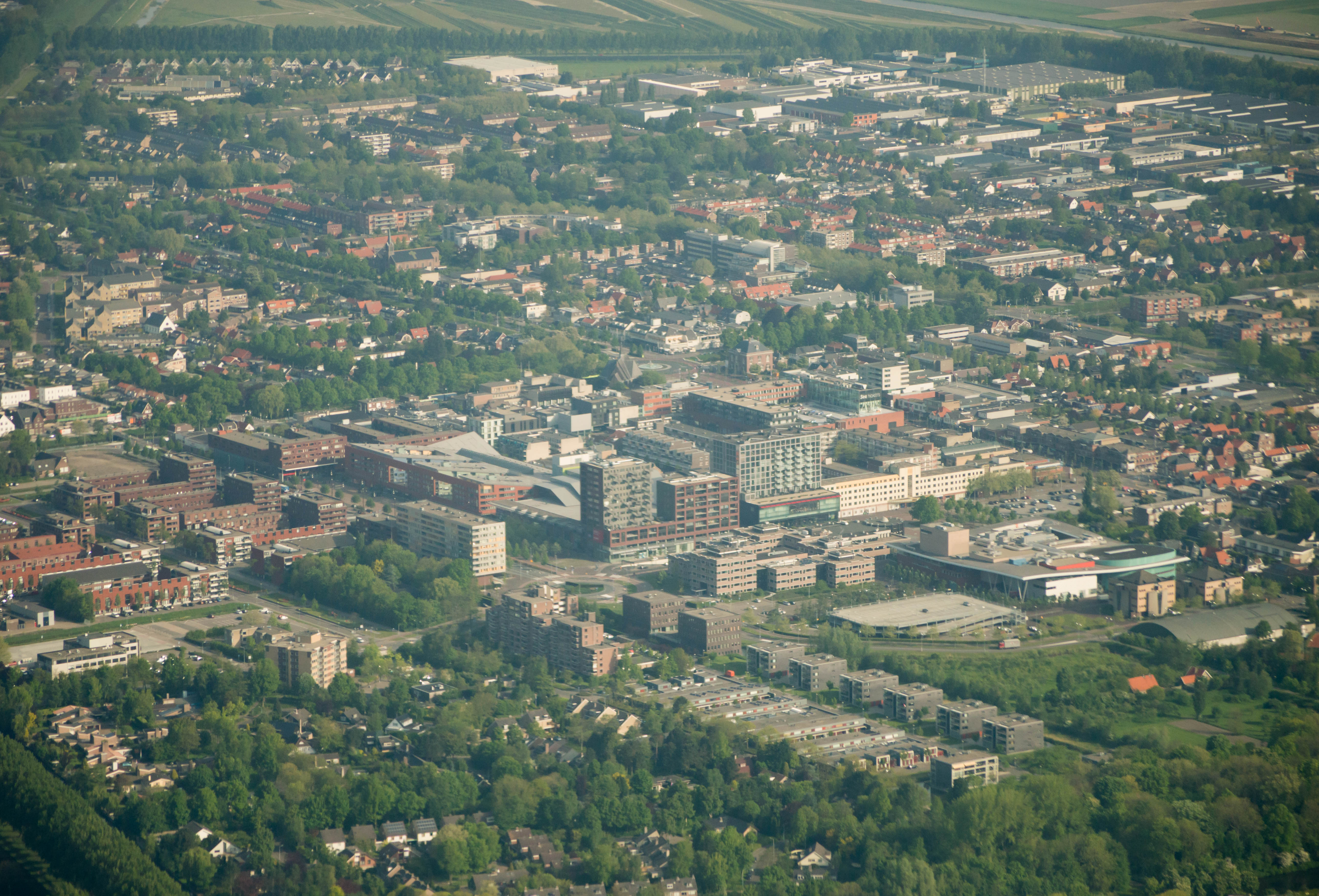 Aerial photograph of the center of Hoofddorp and surroundings, seen from Estonian Air flight OV 174.